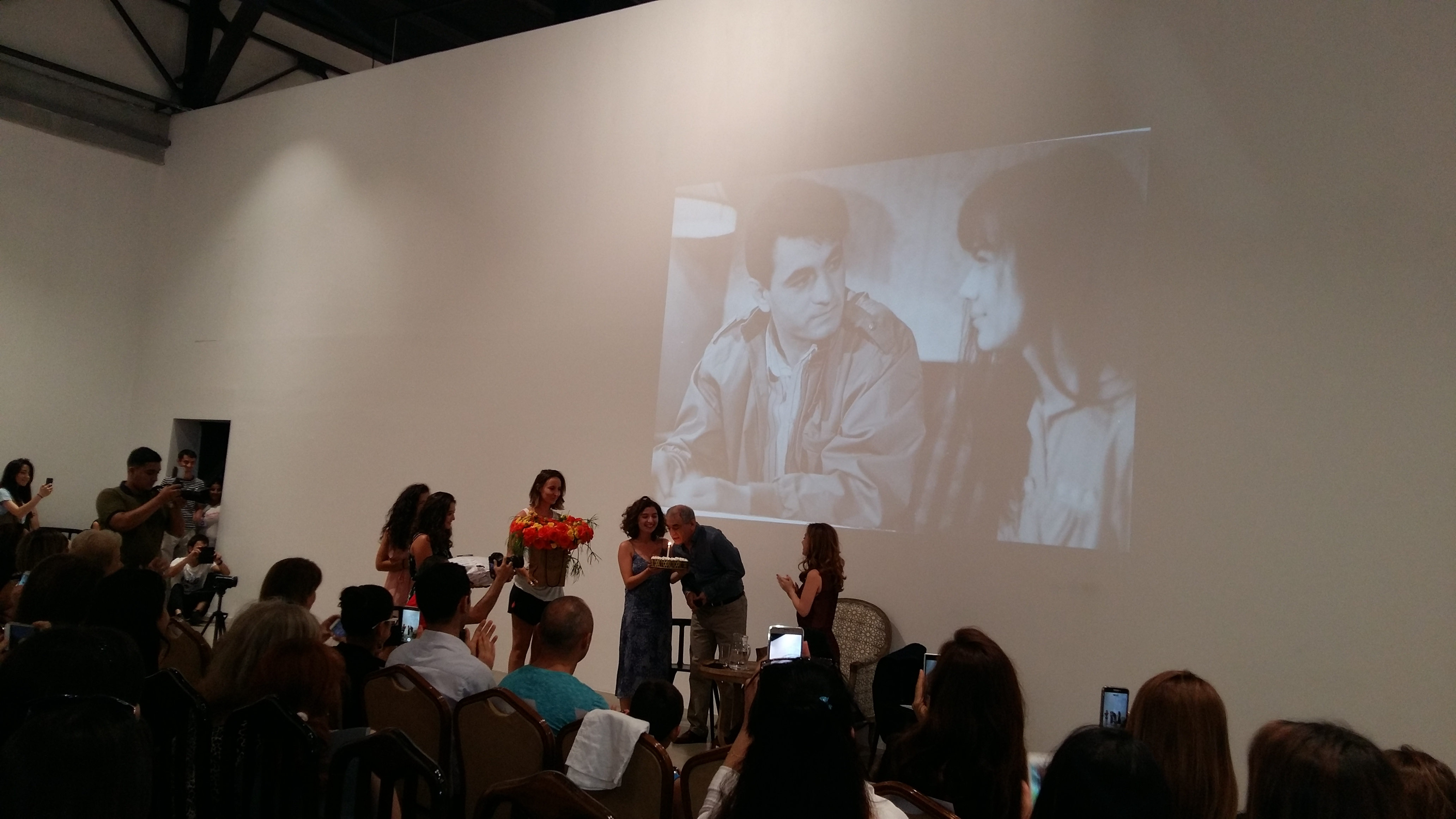 Fəxrəddin Manafov fanatları ilə görüşdə doğum günü tortunun şamlarını üfürərkən